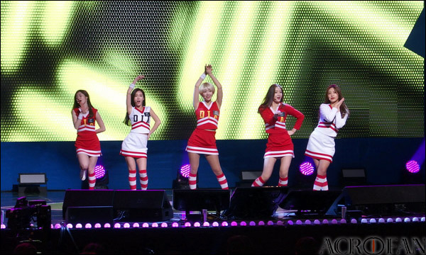 2015 아프리카TV BJ 대상 시상식